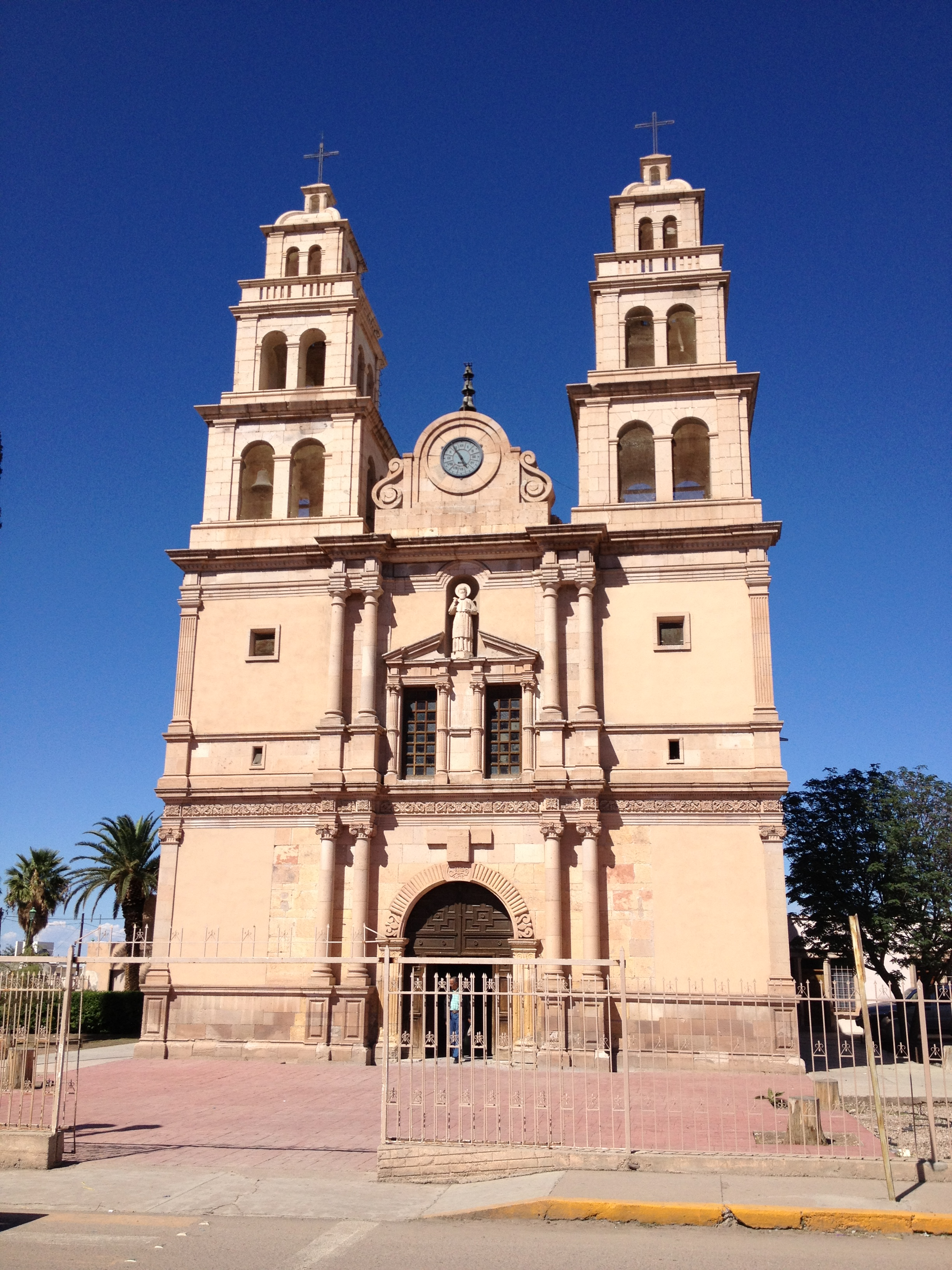 Templo de San Jerónimo en Aldama, Chihuahua